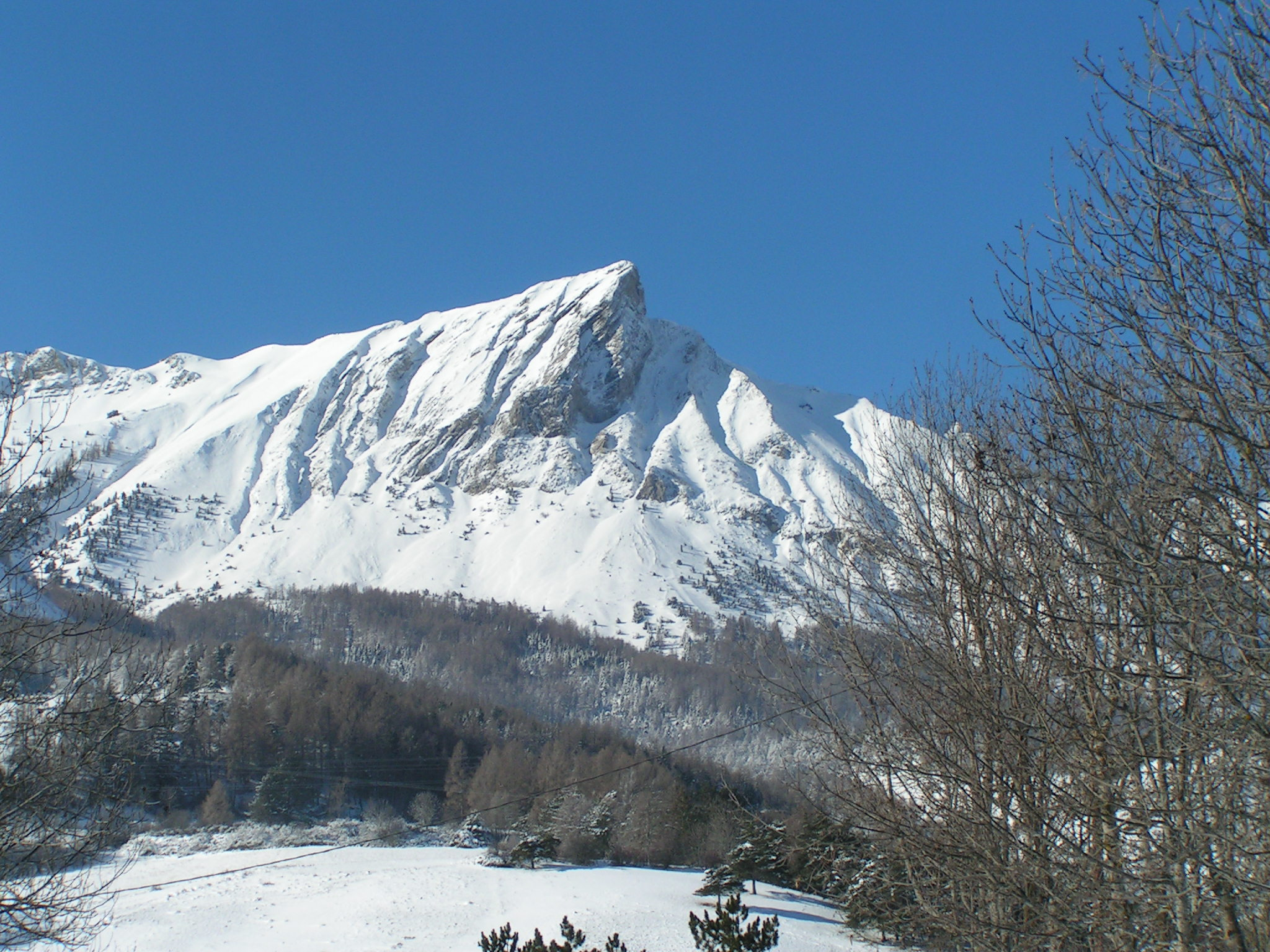 photo du Pic d'Aiguille en hiver